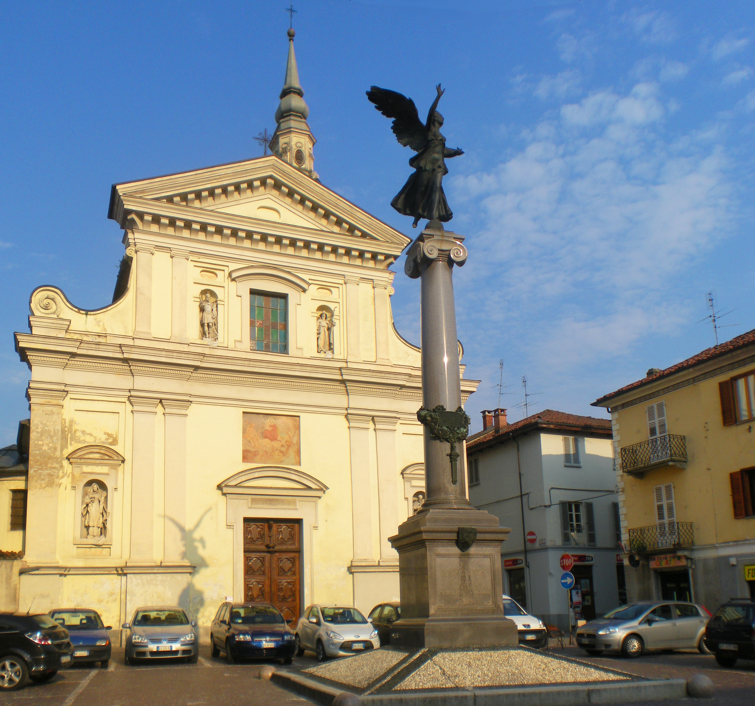 Chiesa della Misericordia e monumento ai caduti a Carignano, in provincia di Torino.